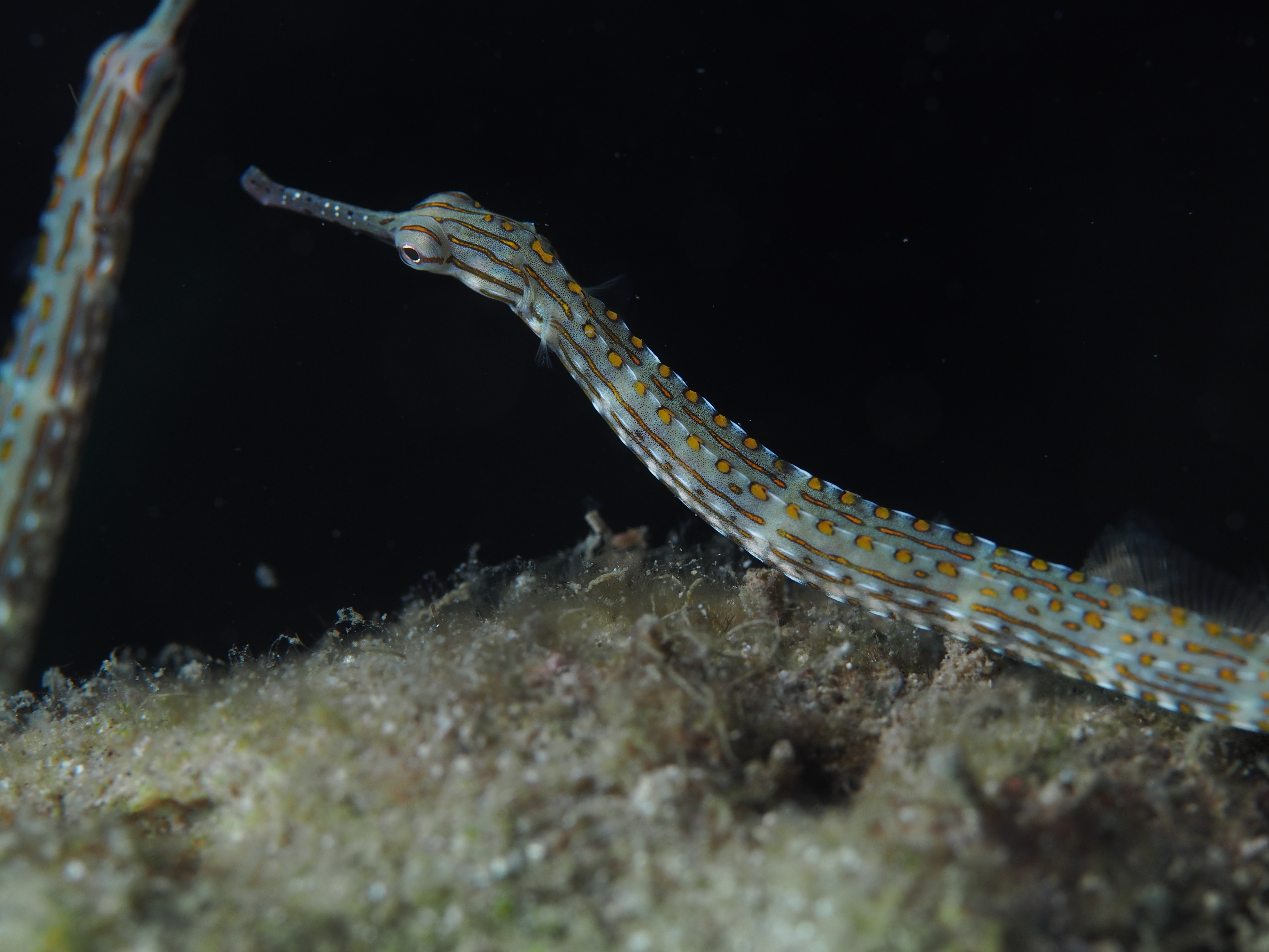 Corythoichthys ocellatus, en Lembeh, Indonesia